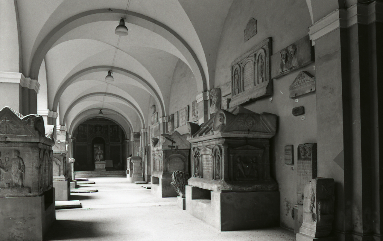 Servizio fotografico : Modena, 1977 / Paolo Monti. - Strisce: 2, Fotogrammi complessivi: 11 : Negativo b/n, gelatina bromuro d'argento/ pellicola ; 35 mm. - ((Sul portanegativi: N[I]K[O]R[MAT] FP4 e iscrizione didascalica e documentaria manoscritta a pennarello sottile blu "Modena 25/37". - . - Confronta scheda 2968Lpbn27-37. - Occasione: Documentazione musei civici Emilia-Romagna. - Fonte: Agenda di Paolo Monti: Leica 1501-3000 Controllo numerazione (1950-1978), presso Archivio Paolo Monti. - Fonte: Fattura di Paolo Monti: IV. Commesse/ Fattura n. 24/ Riprese fotografiche musei civici Emilia Romagna (1977/10/26), presso Archivio Paolo Monti